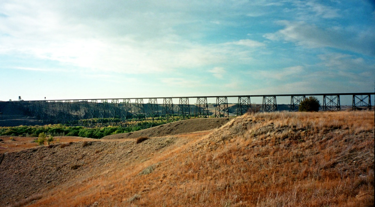 Lethbridge